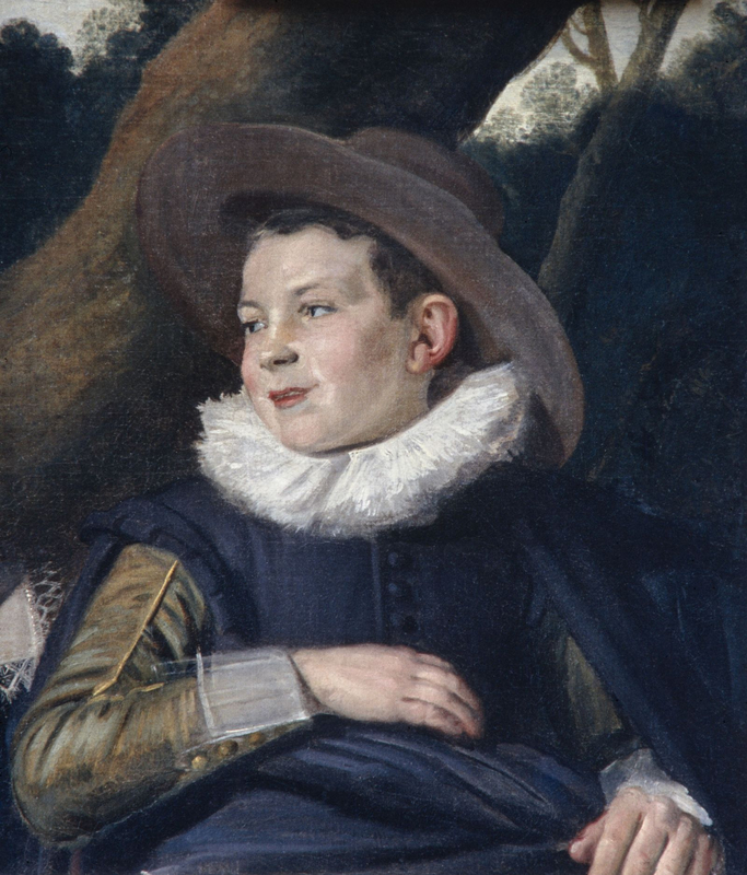 Frans Hals, Portrait d'un jeune garçon de la famille Van Campen (fragment), vers 1623-1625, Collection particulière